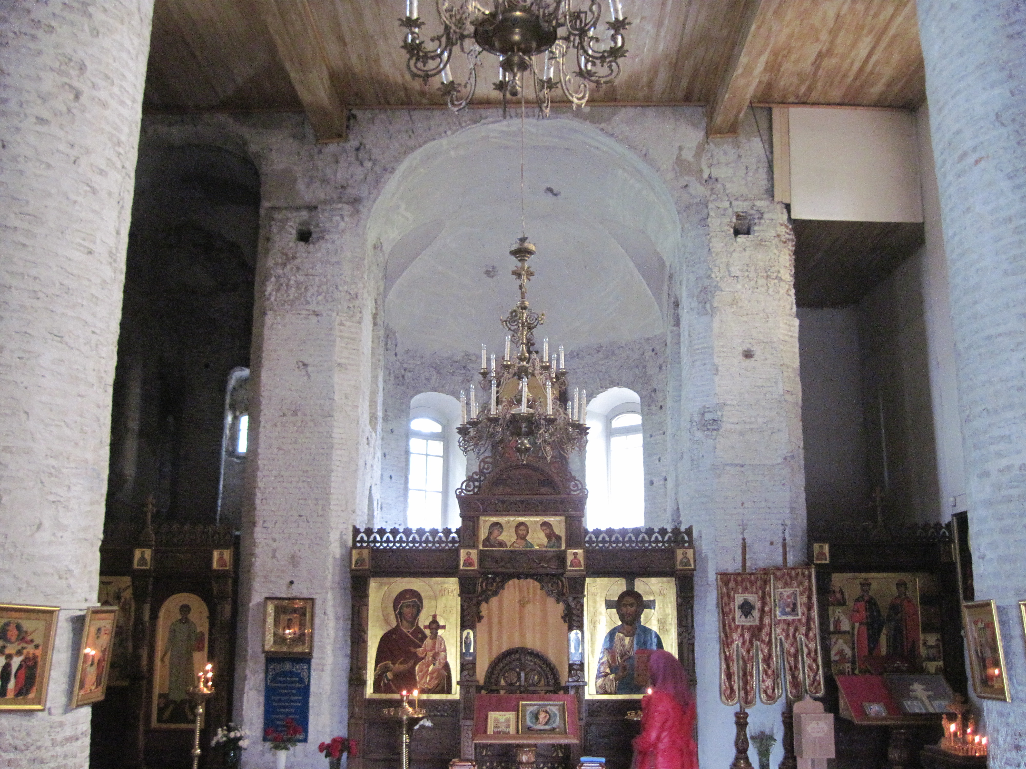 Выгляд артарнай часткі Каложскай царквы ў Гродне